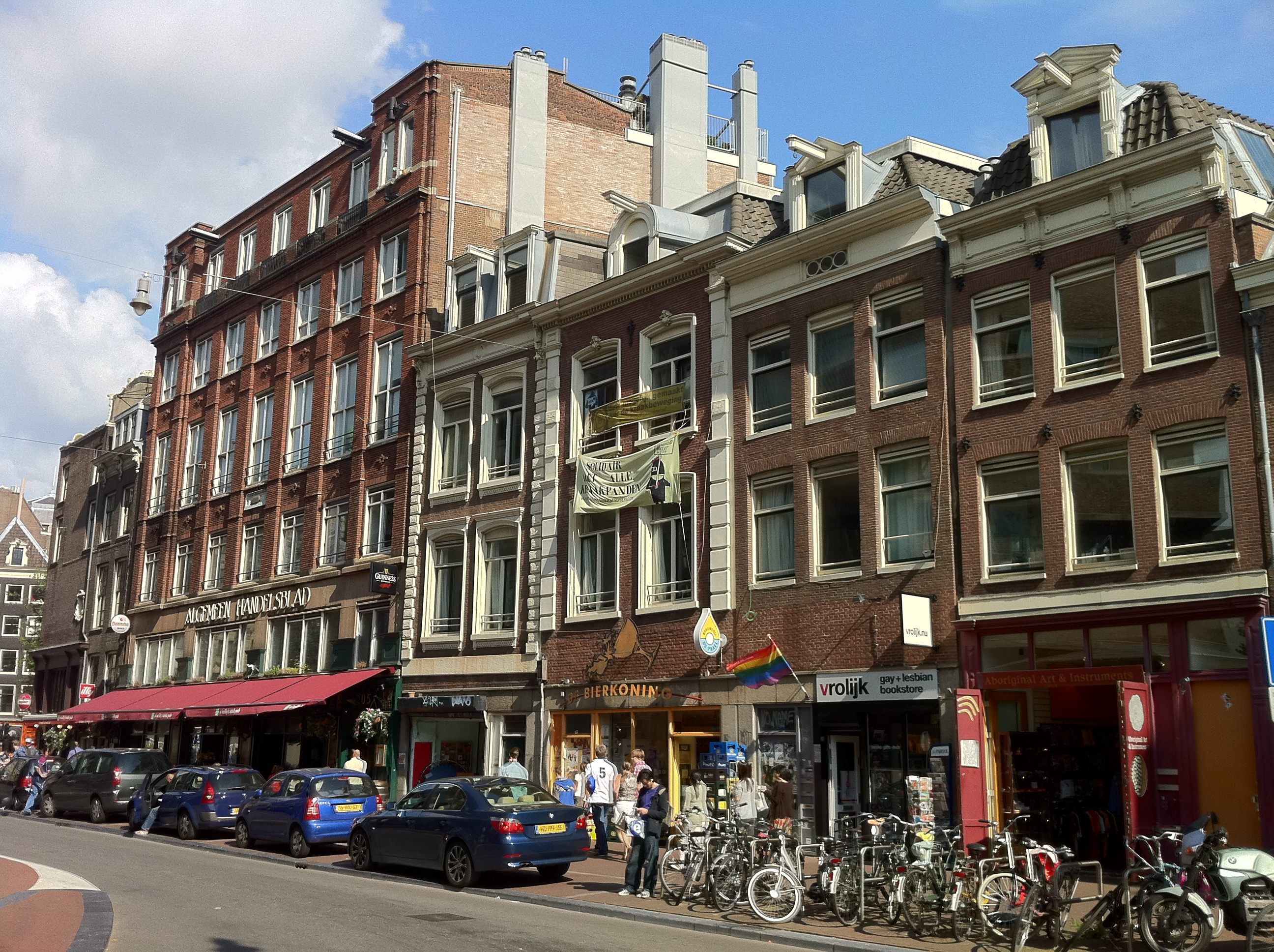 Complex waar tot 1970 het Algemeen Handelsblad was gevestigd